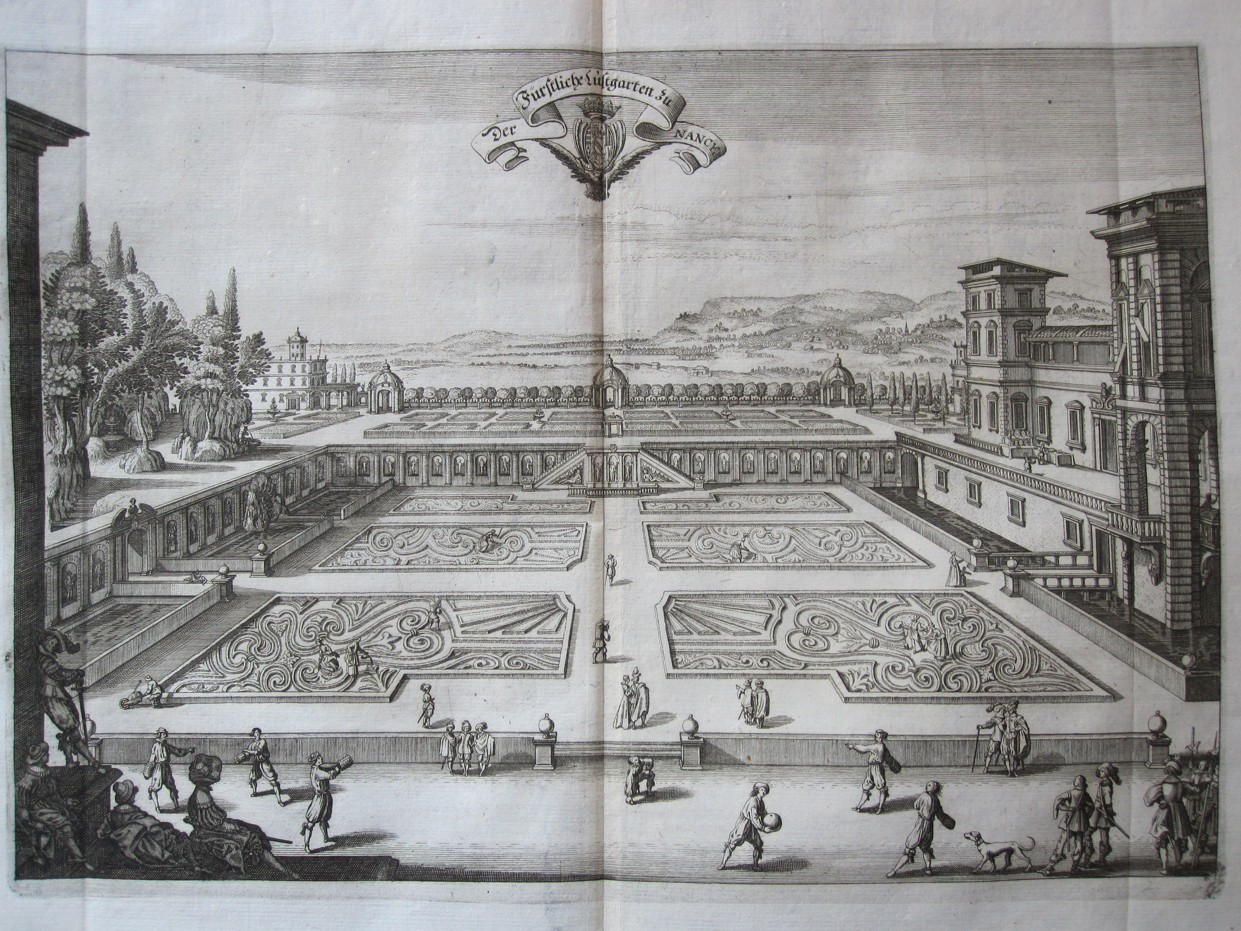 Der Fürstliche Lustgarten zu Nancy